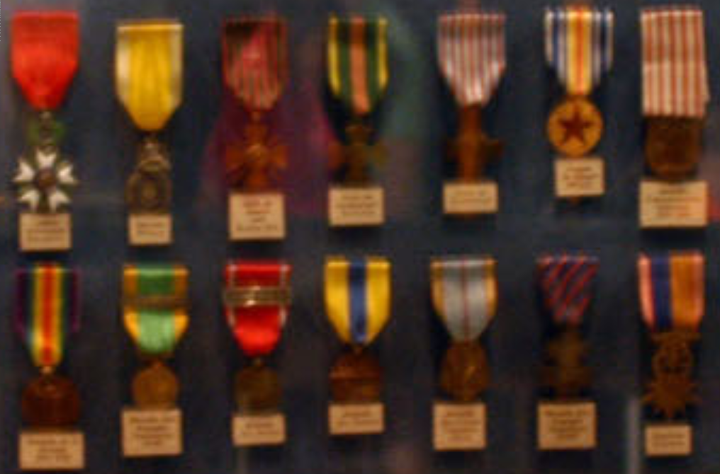 Décorations militaires d'Eugene Jacques Bullard pilote dans l'Armée française durant la Première Guerre mondiale